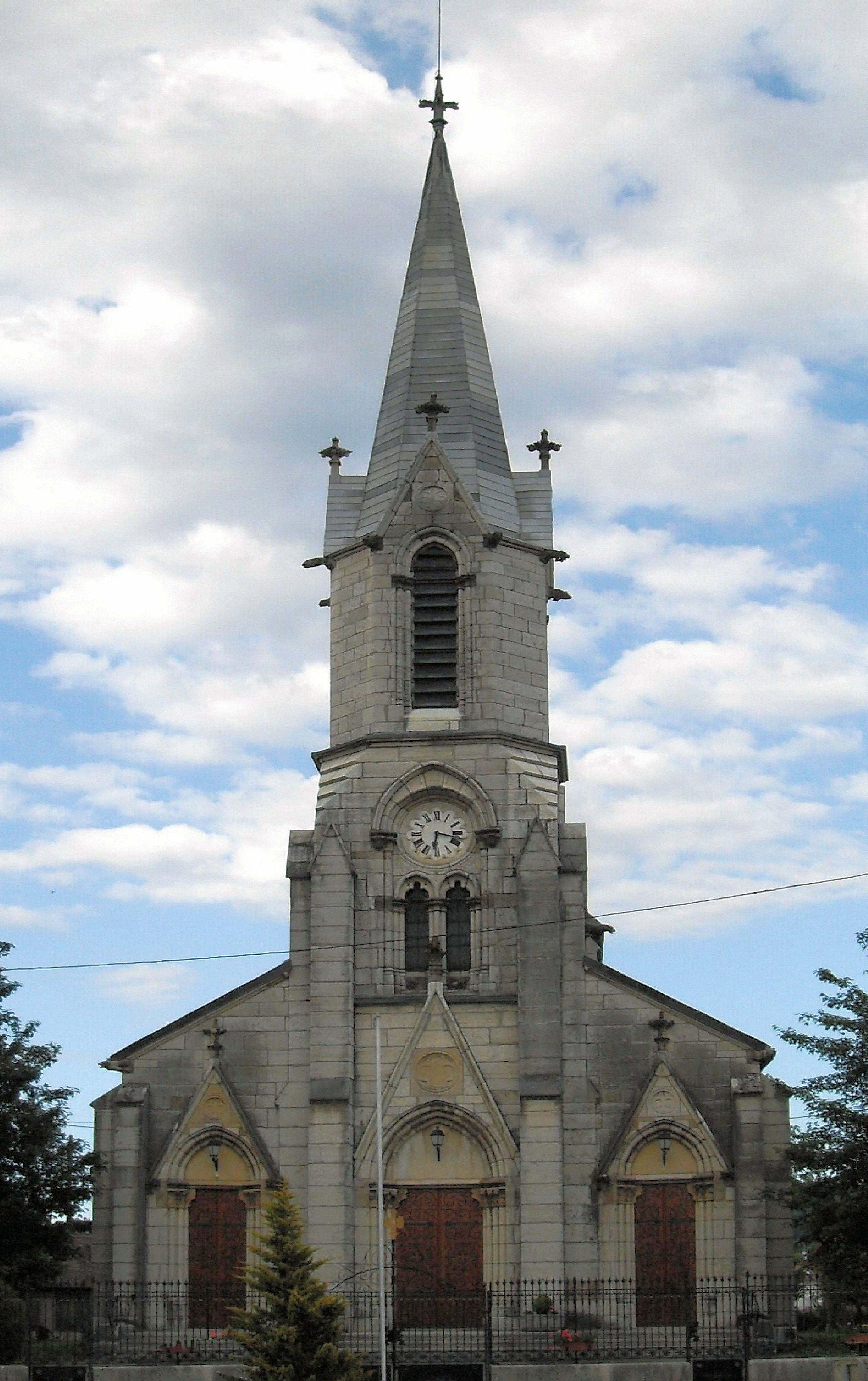 L'église Saint-Jacques et Saint-Christophe à Courtavon